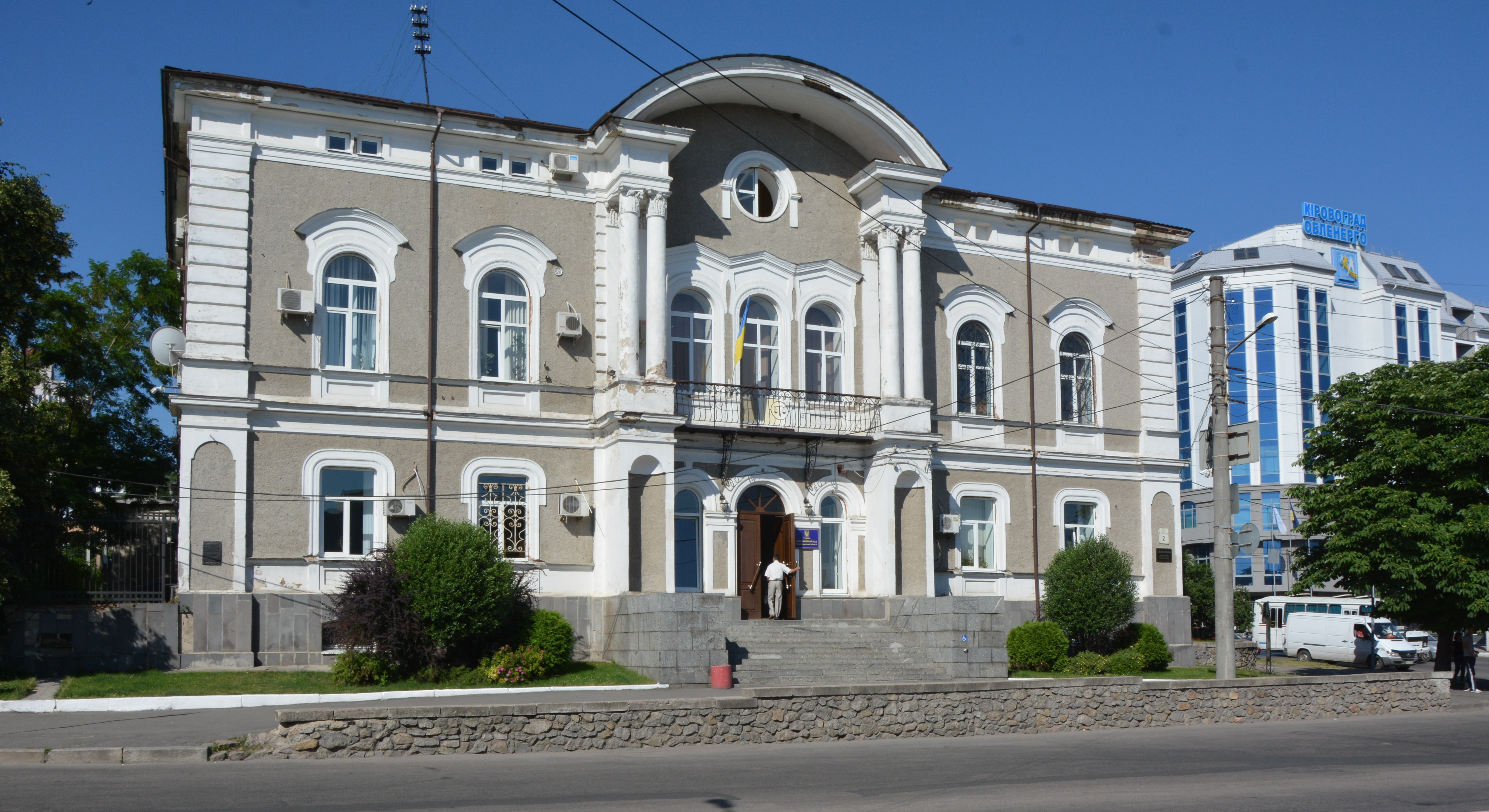 Будинок окружного суду, Кіровоград, вул. Велика Пермська, 2/57 (Велика Перспективна)